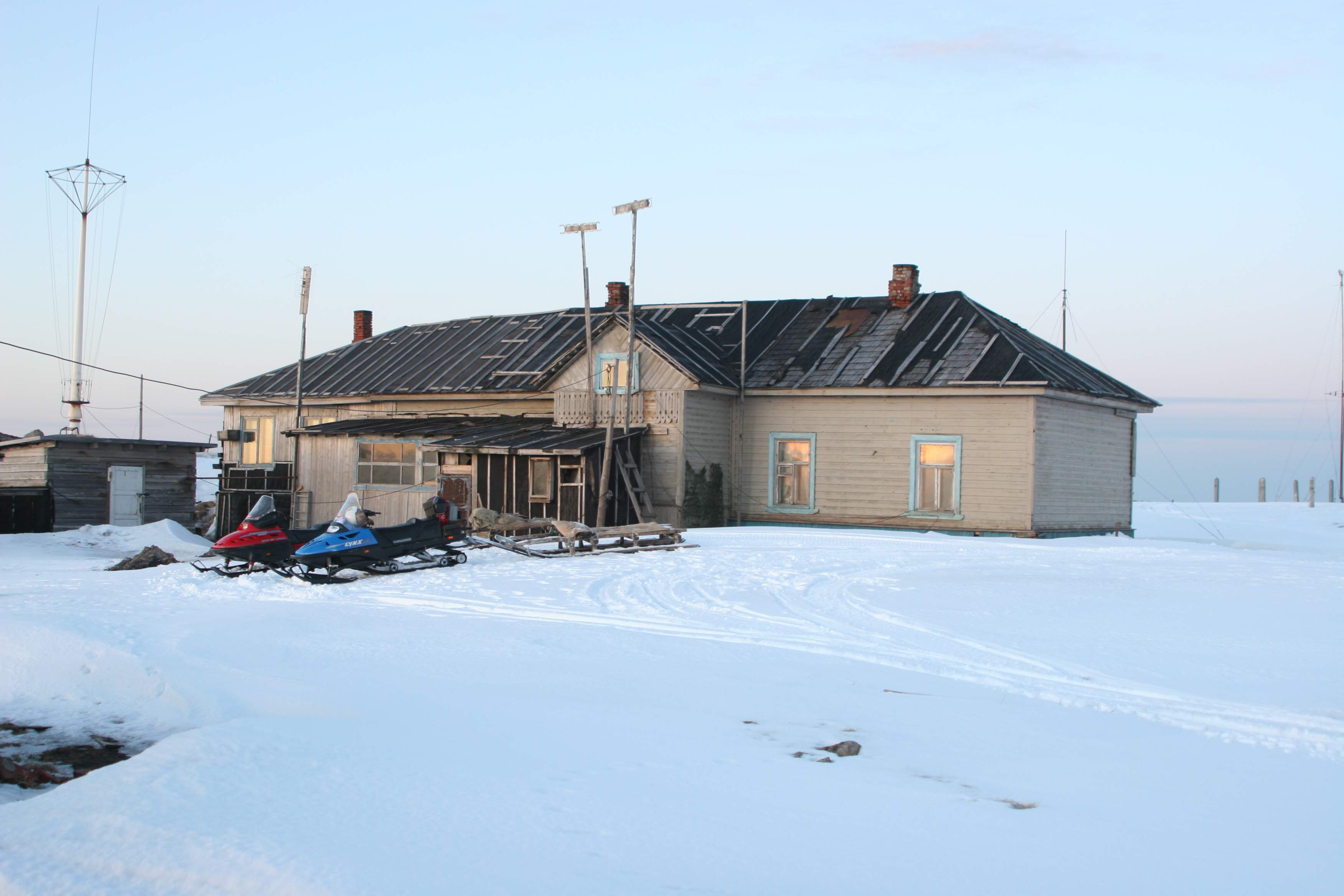 Метеостанция на Святом Носе